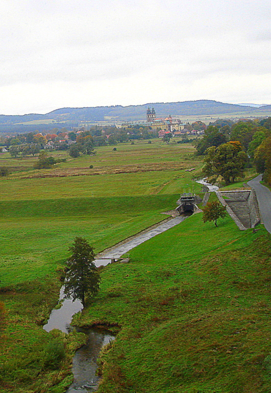 Zadrna w Krzeszówku